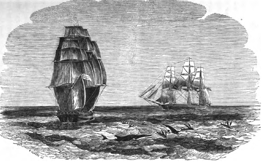 Die Royal sovereign und Piratent